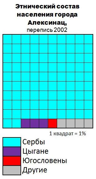 Этнический состав населения города Алексинац (2002)